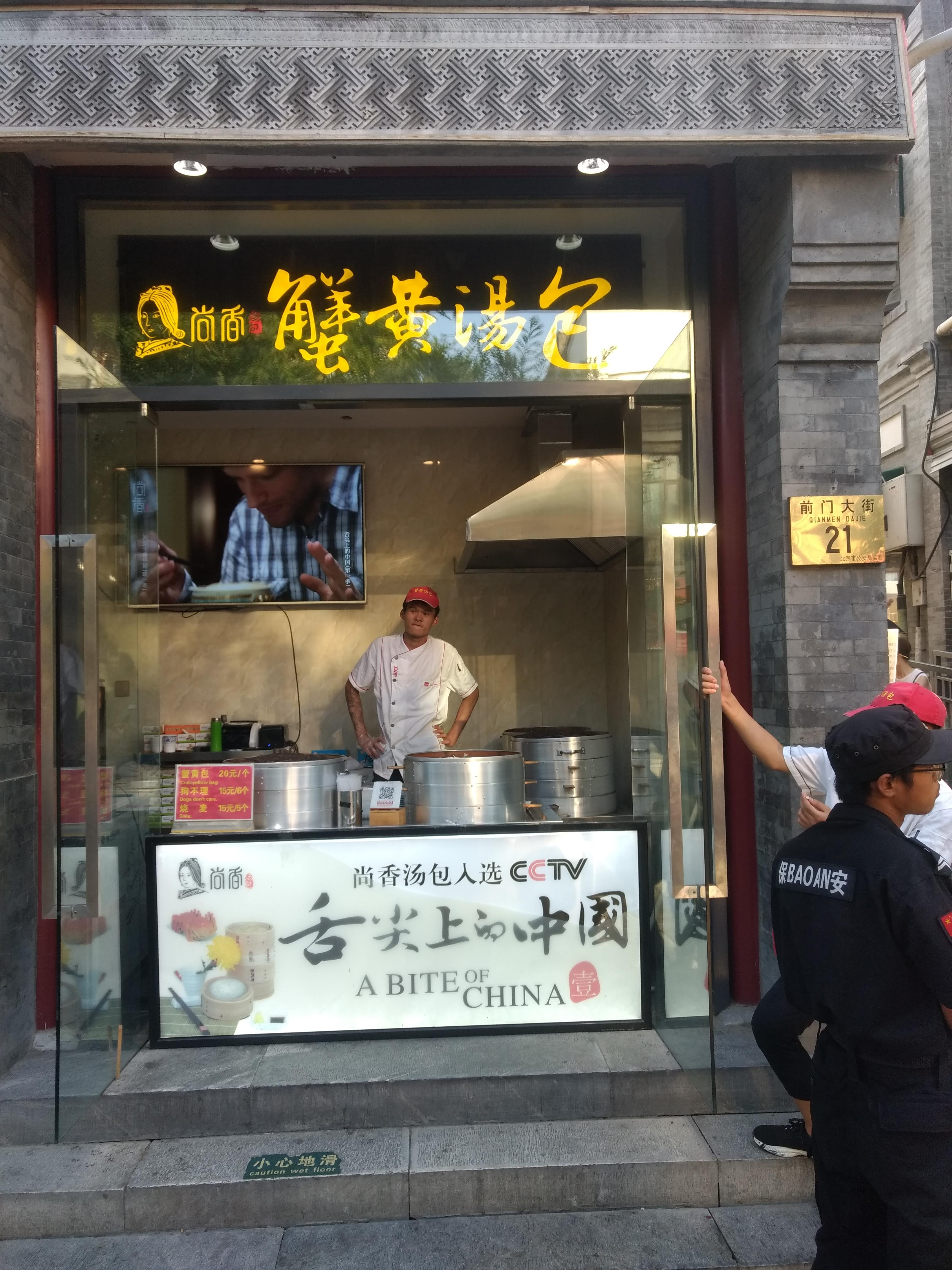 Botiga d'empanadilles a Wangfujing, Beijing. Tenen un cartell del programa de CCTV "A Bite of China".